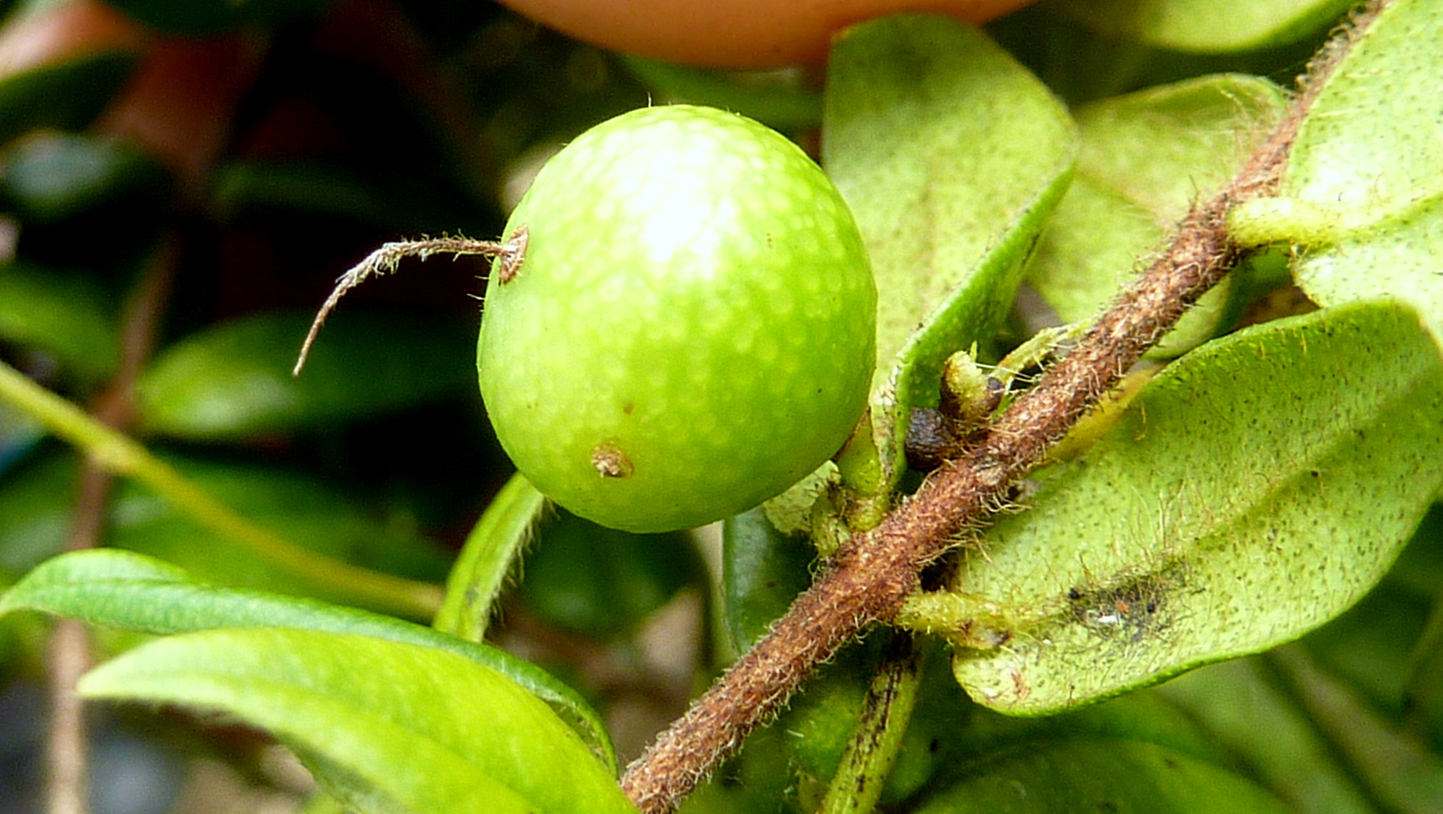 Myrciaria ferruginea O.Berg